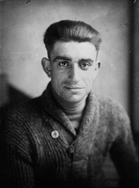 Antonin Magne lors du Paris Bruxelles 1929